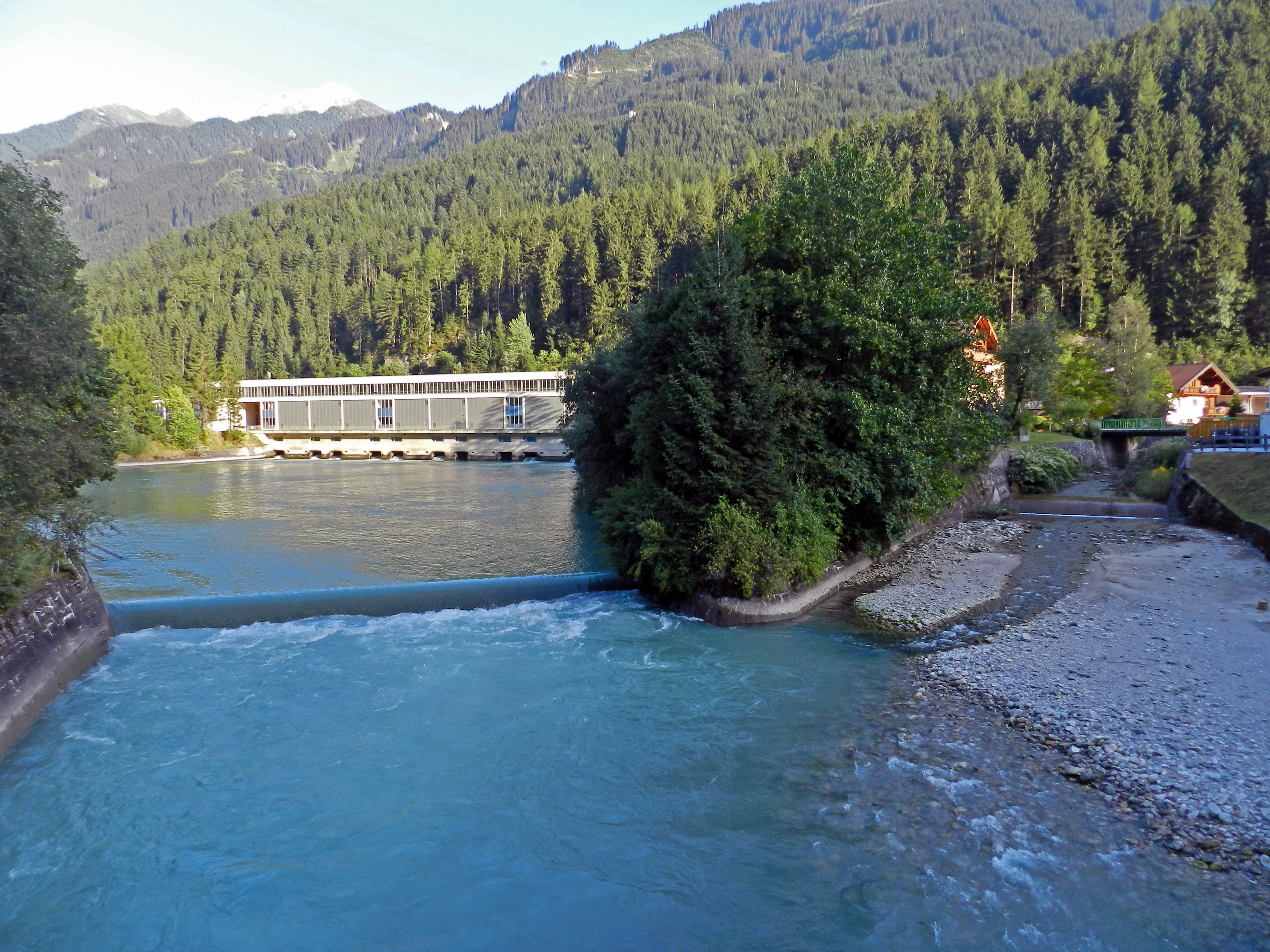 Abfluss des Wasserkraftwerks Mayrhofen (Tirol, Österreich) in den Stilluppbach (rechts)